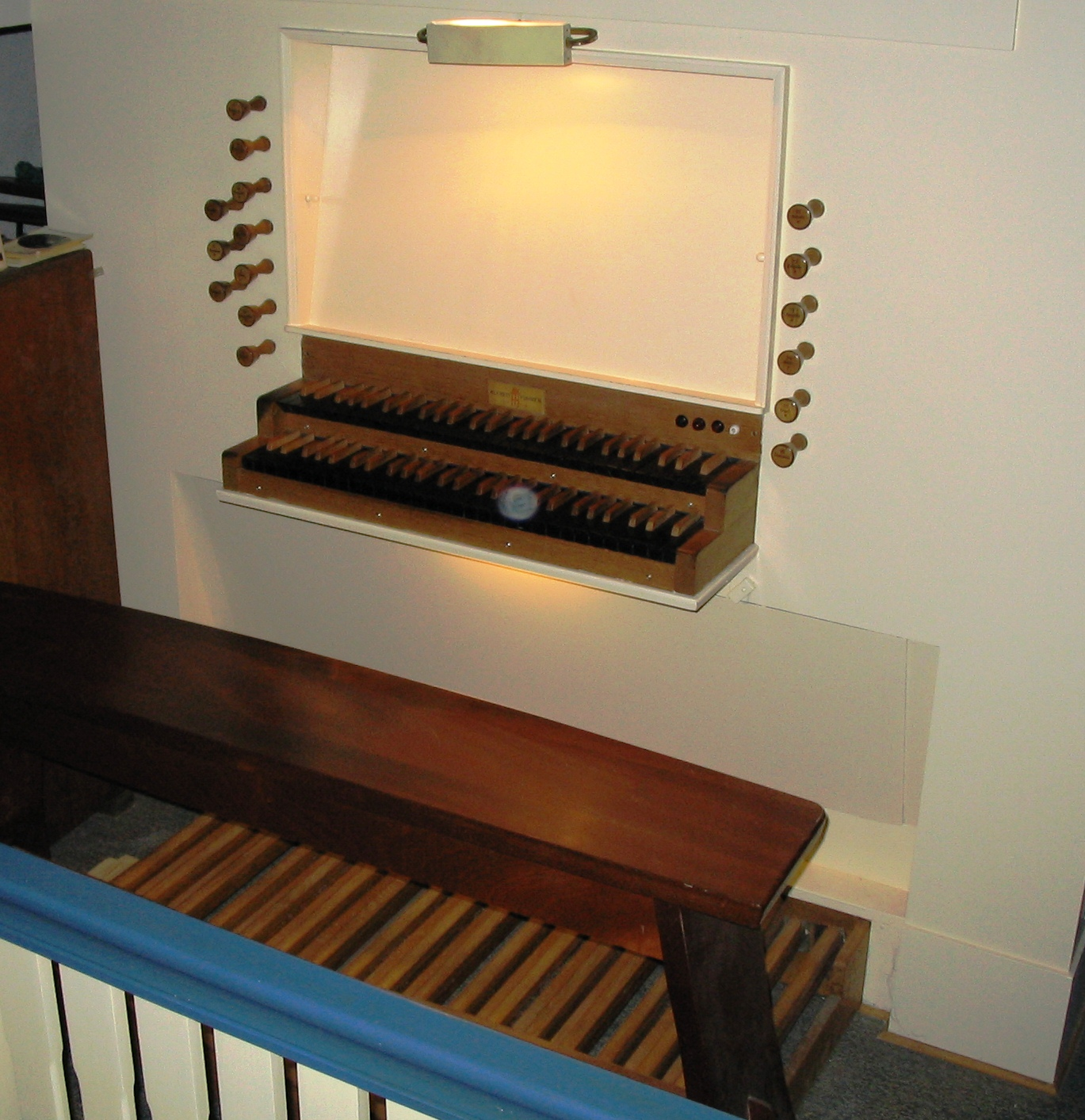 Ev. Inselkirche Juist, Führer-Orgel, Spieltisch mit Pedal